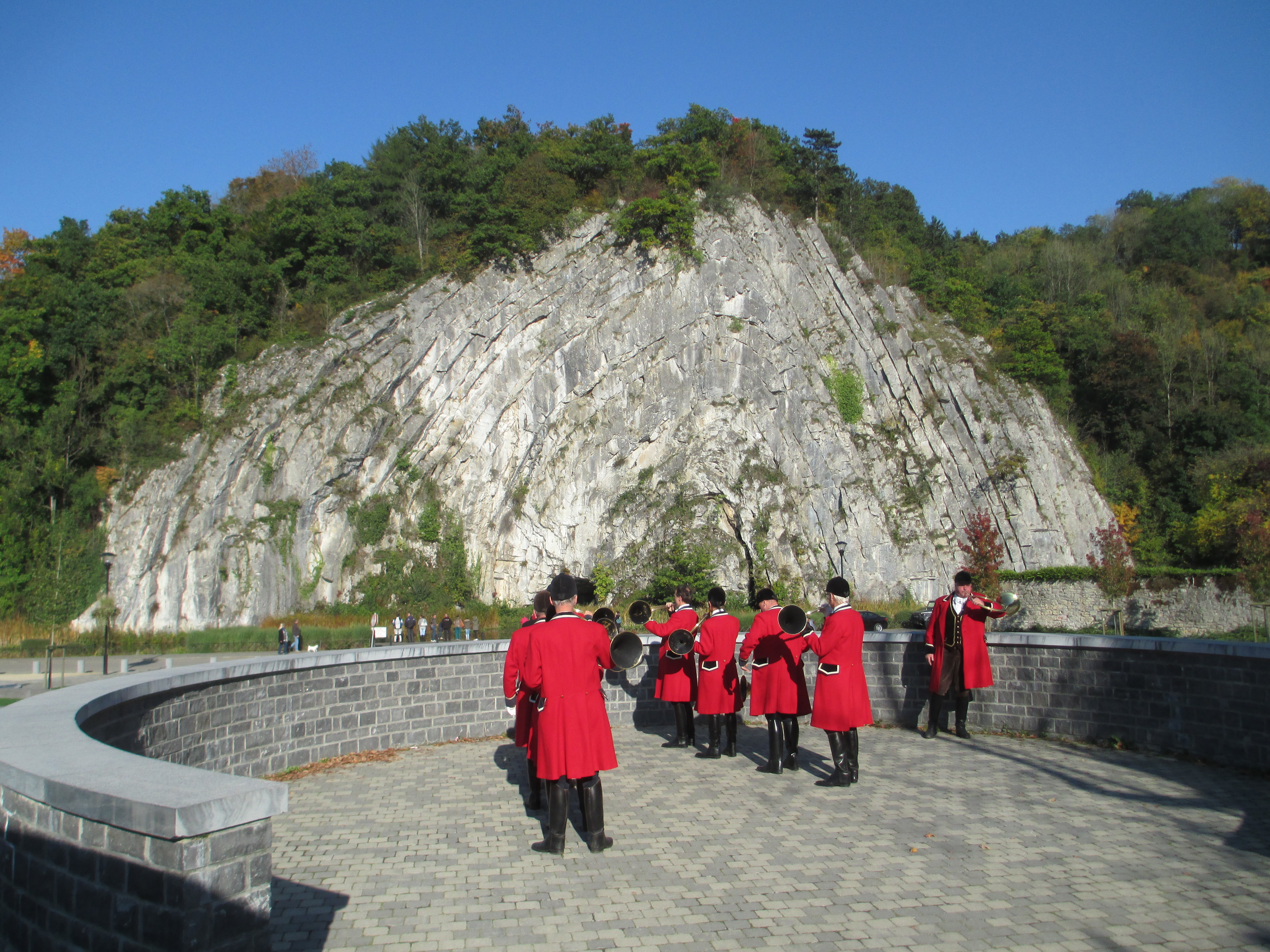 Durant de nombreuses années, le "Débuché de Vielsalm", groupe de sonneurs de trompes de chasse, a animé la Foire de Saint-Hubert de novembre à Theux, notamment à 14 h 00 lors de la bénédiction des chevaux et des animaux de compagnie, rue Chaussée et place de l’église, et le soir à 18 h 00 pour la bénédiction et la messe dans l’église des Saints-Hermès-et-Alexandre. Le "Débuché de Vielsalm" (auparavant nommé "Rallye Saint-Gengoux") fêtait le samedi 16 mai 2015 ses 50 ans d'existence et s'est vu remettre le titre de Société Royale. Voici ce groupe en concert, le 11 octobre 2015, devant le rocher d’Homalius de Durbuy, plus connu sous le nom de roche à la Falize. En forme de « u » retourné, ce type de roche appelé anticlinal a plus de 300 millions d’années. Son sommet est le point culminant de la ville de Durbuy, considérée comme étant « la plus petite ville du monde » (slogan touristique).